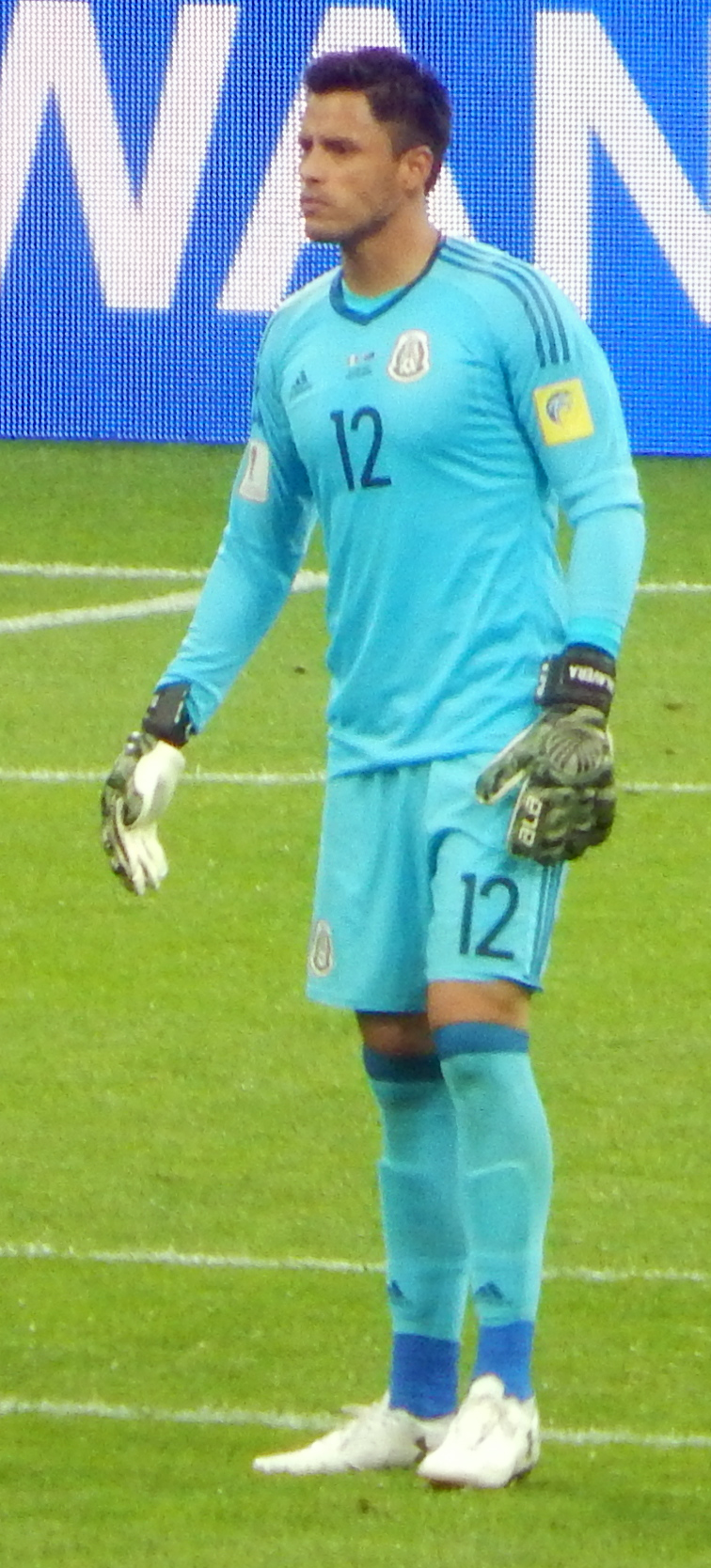 Альфредо Талавера в матче против сборной Новой Зеландии